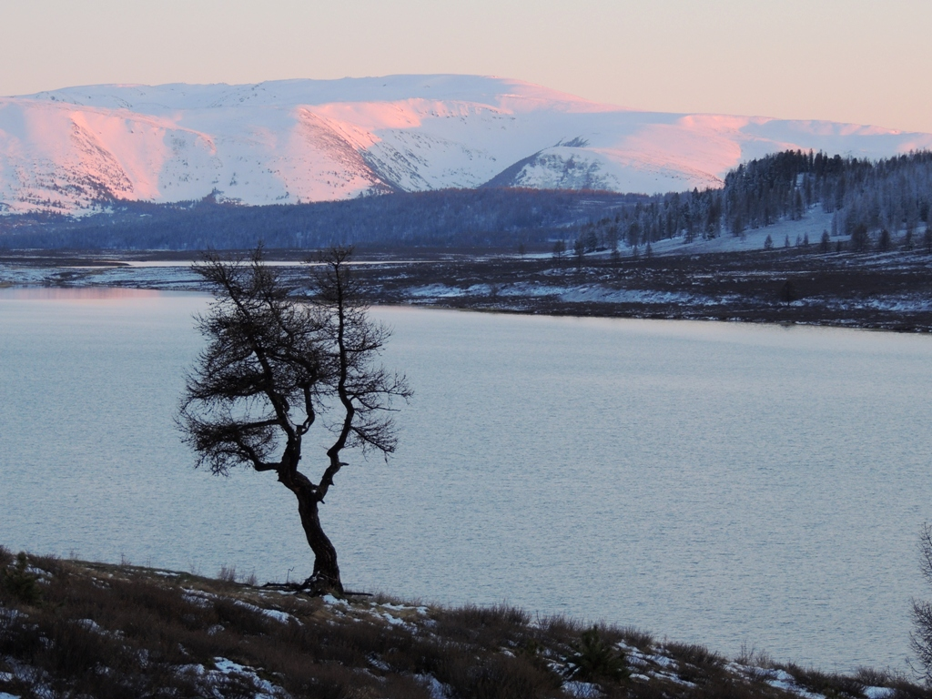 Озеро Узункёль, республика Алтай